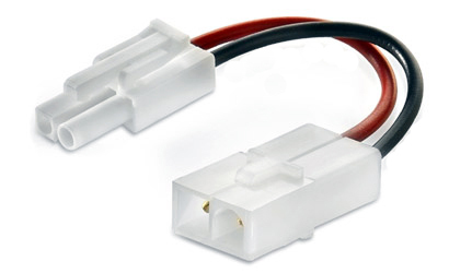 adapter cable Tamiya / Tamiya mini